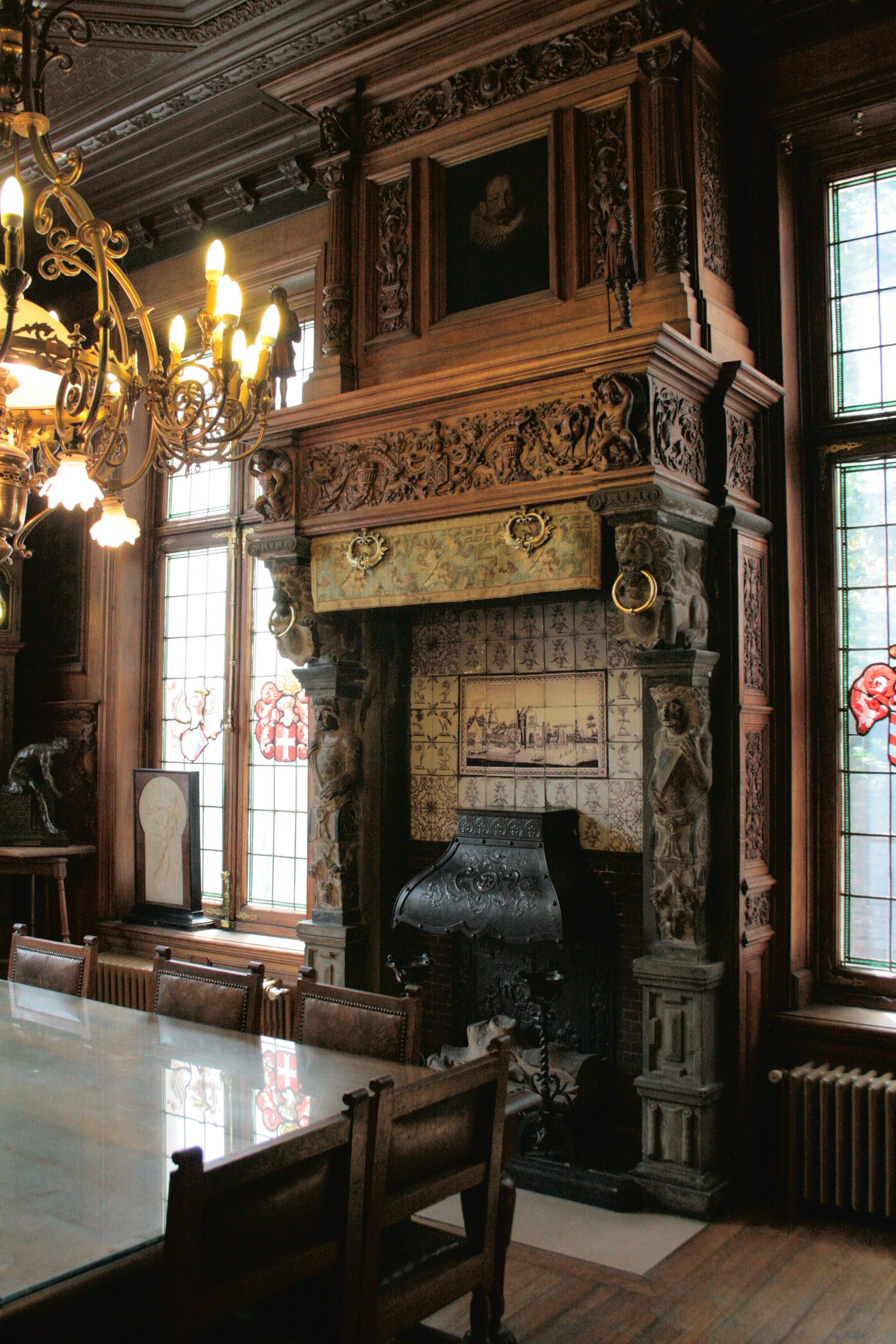 Maison des Arts, ancien château Eenens, à l'arrière du 147 chaussée de Haecht, Schaerbeek (Bruxelles). Actuellement centre culturel.